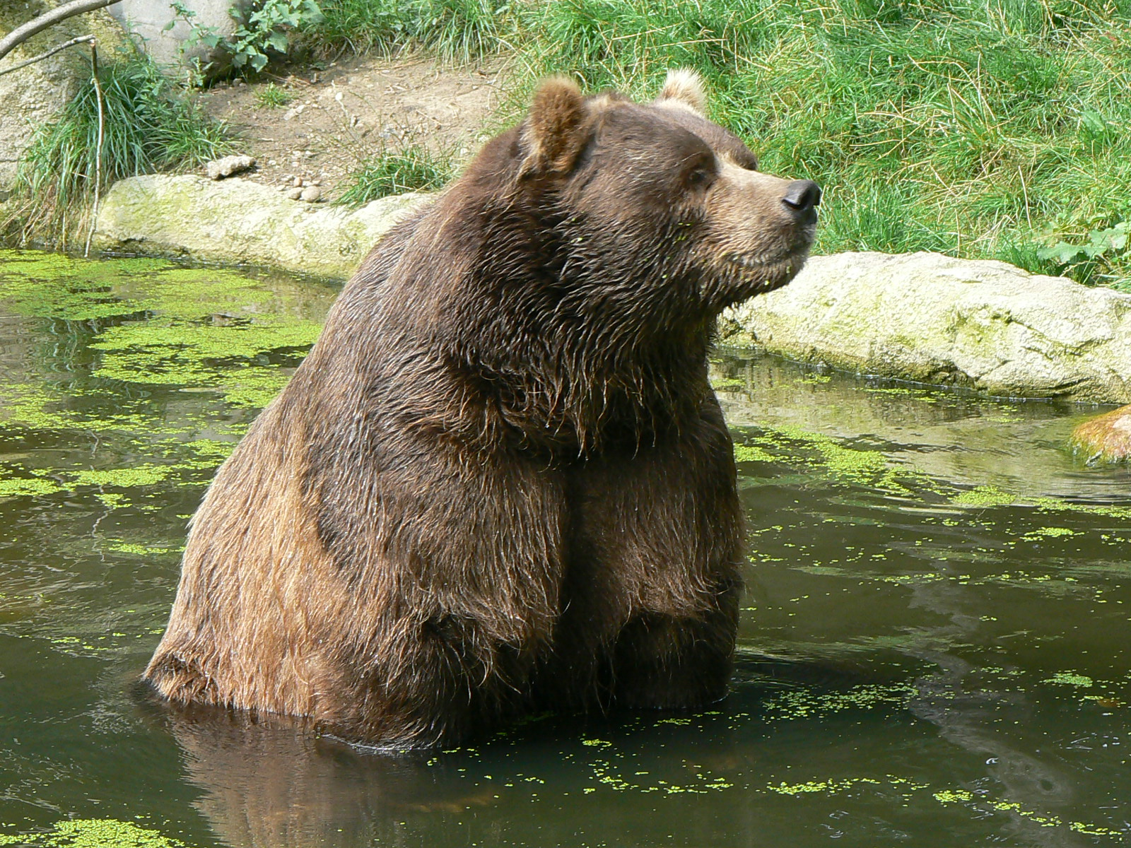 Ursus arctos middendorffi /kodiak bear/ Kodiakbär